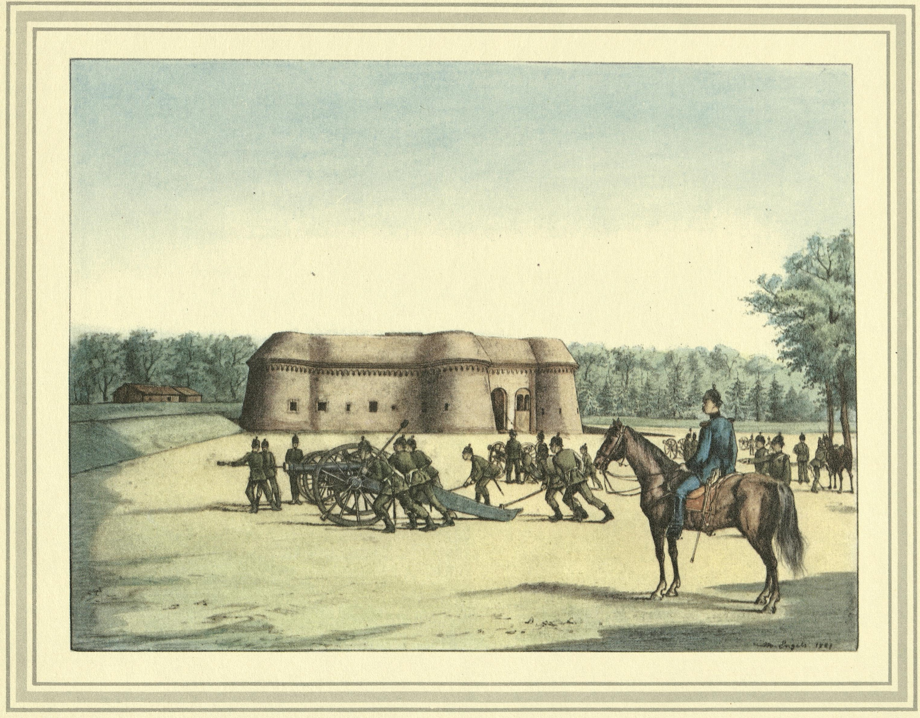 Dessin pittoresque de la forteresse de la Confédération germanique (Bundesfestung) Luxembourg par Michel Engels (1851-1901): XXI - Le fort Charles